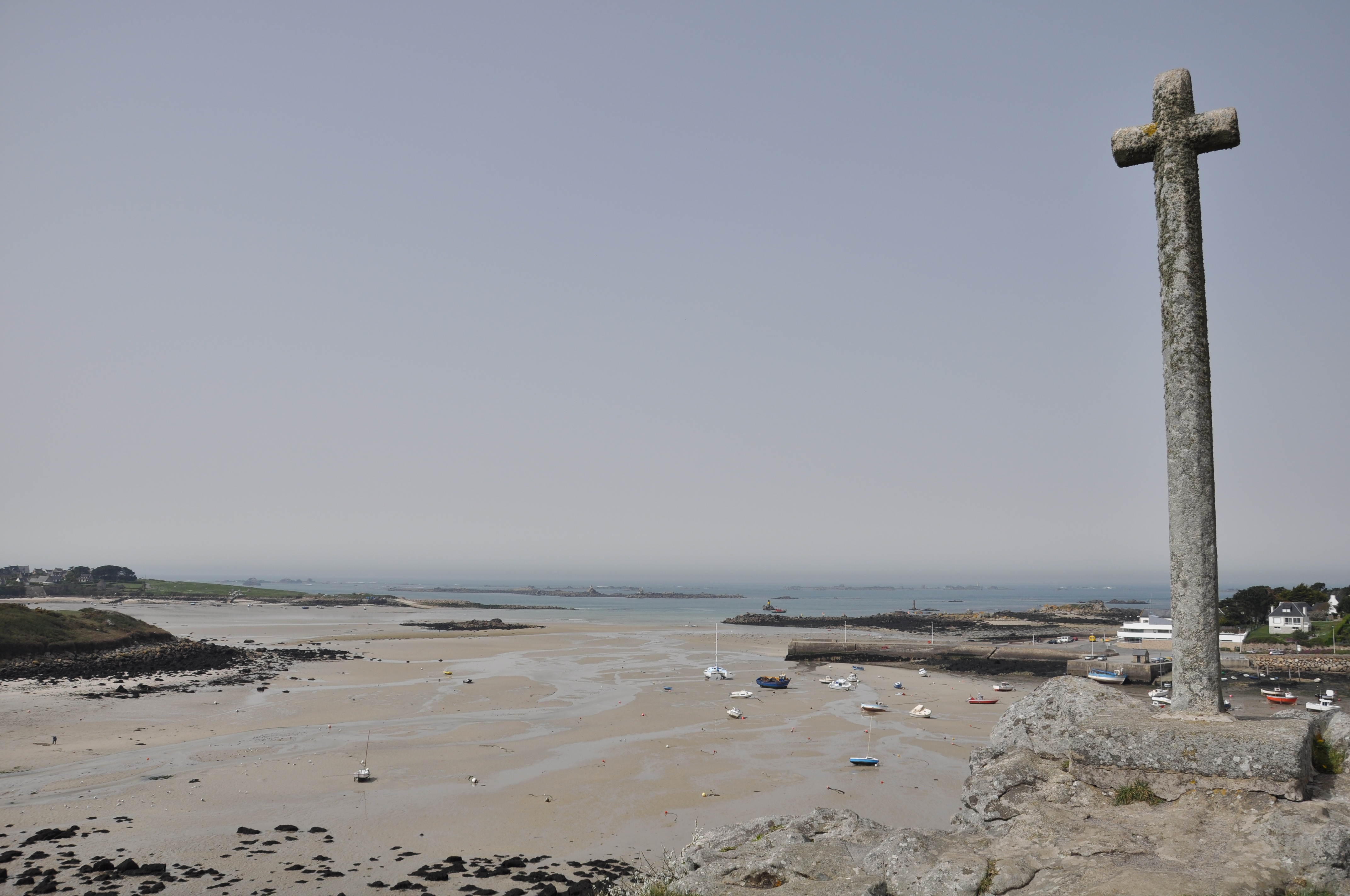 Croix du Guilliguy surplombant le port de Portsall(29, France) à marée basse par un jour ensoleillé de printemps.